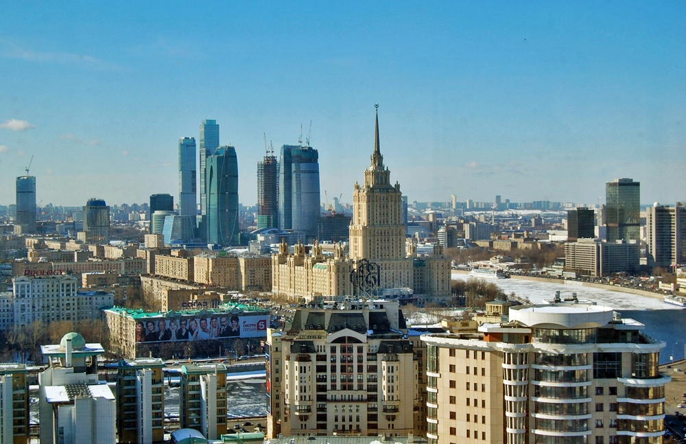 большая москва-сити